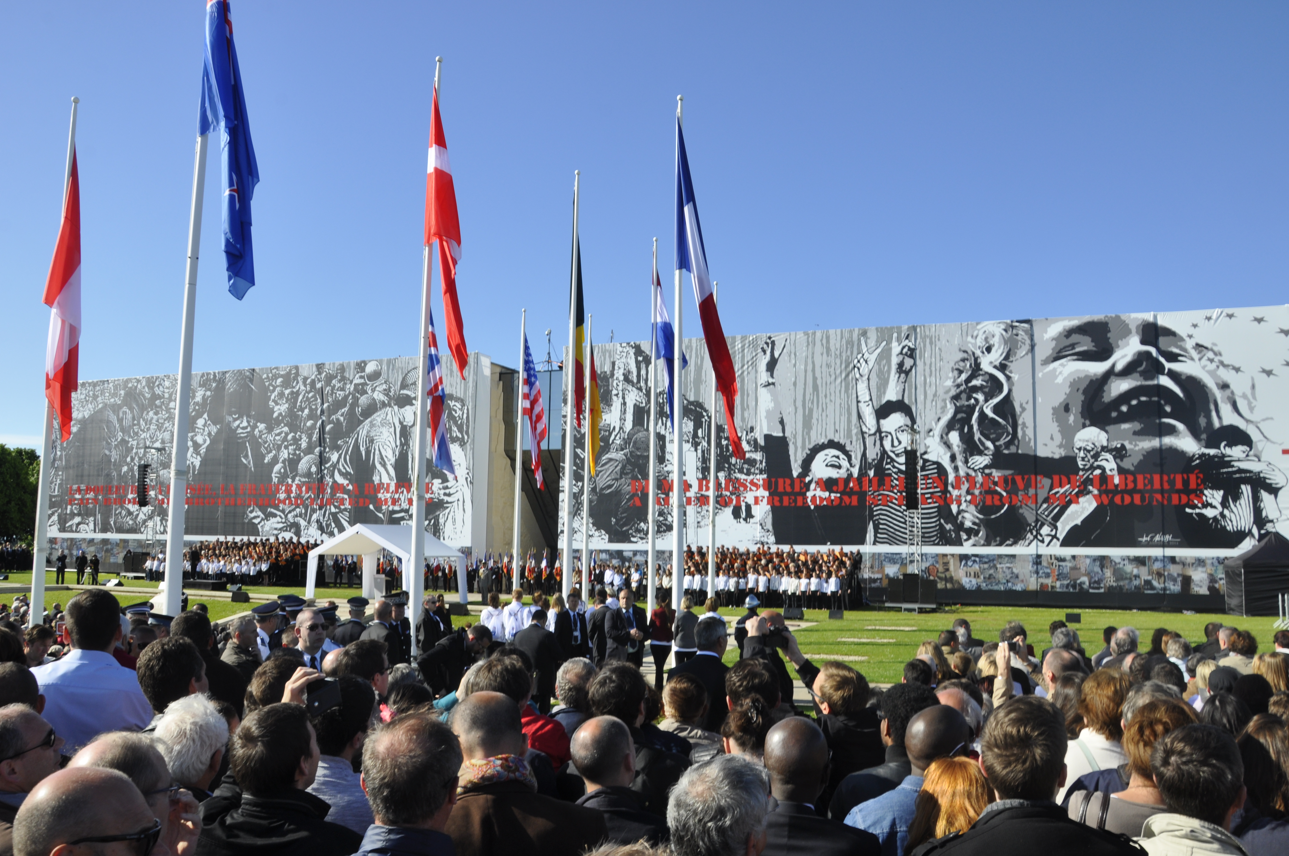 Cérémonie d'hommage aux victimes civiles de la bataille de Normandie le 6 juin 2014 au Mémorial de Caen